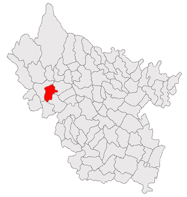 Categorie:Hărţi ale judeţului Buzău